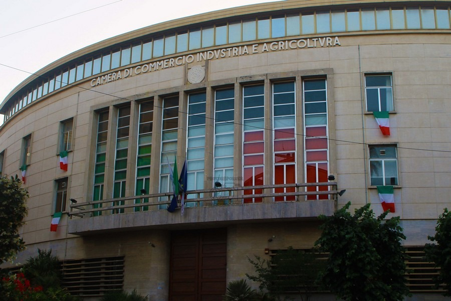 Veduta frontale della Camera di Commercio di Cosenza nel centro della cittàmoderna